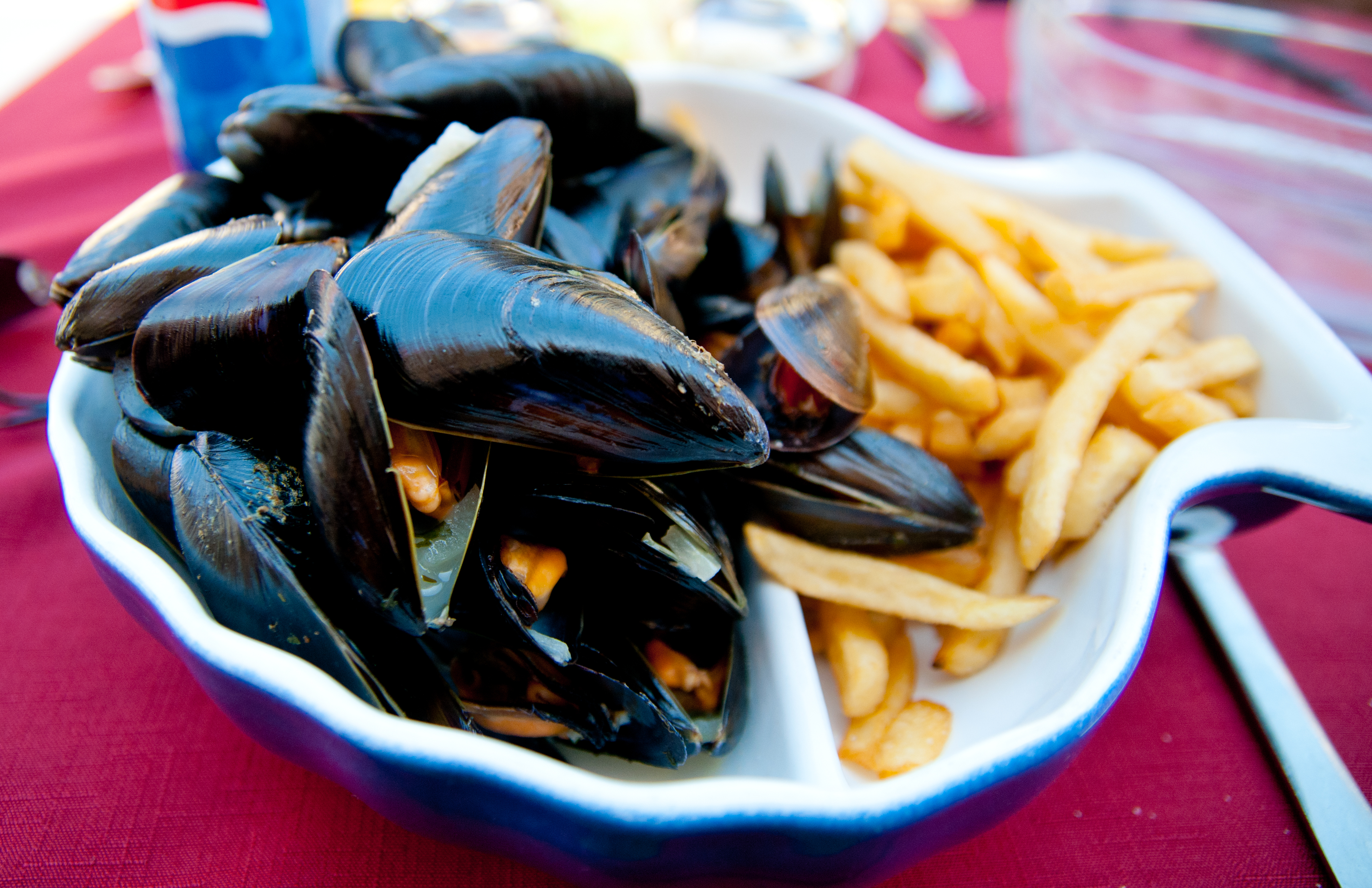 Lunchtime, moules frites in da house!!